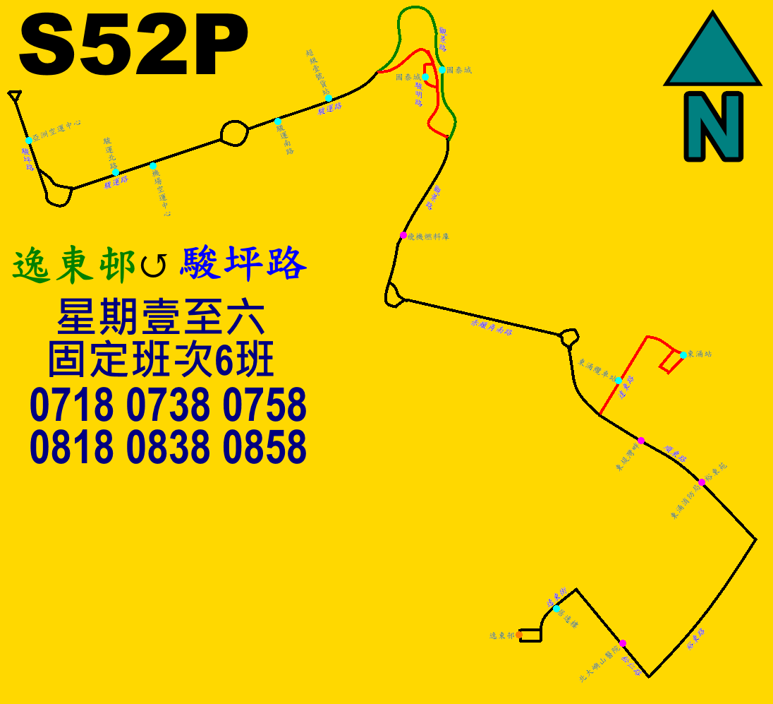 中文（香港）: 城巴S52P線的走線圖